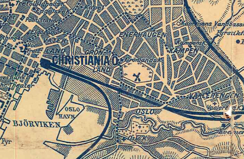 Gammelt kart som viser trikkelinjene til Kampen og Vålerenga.